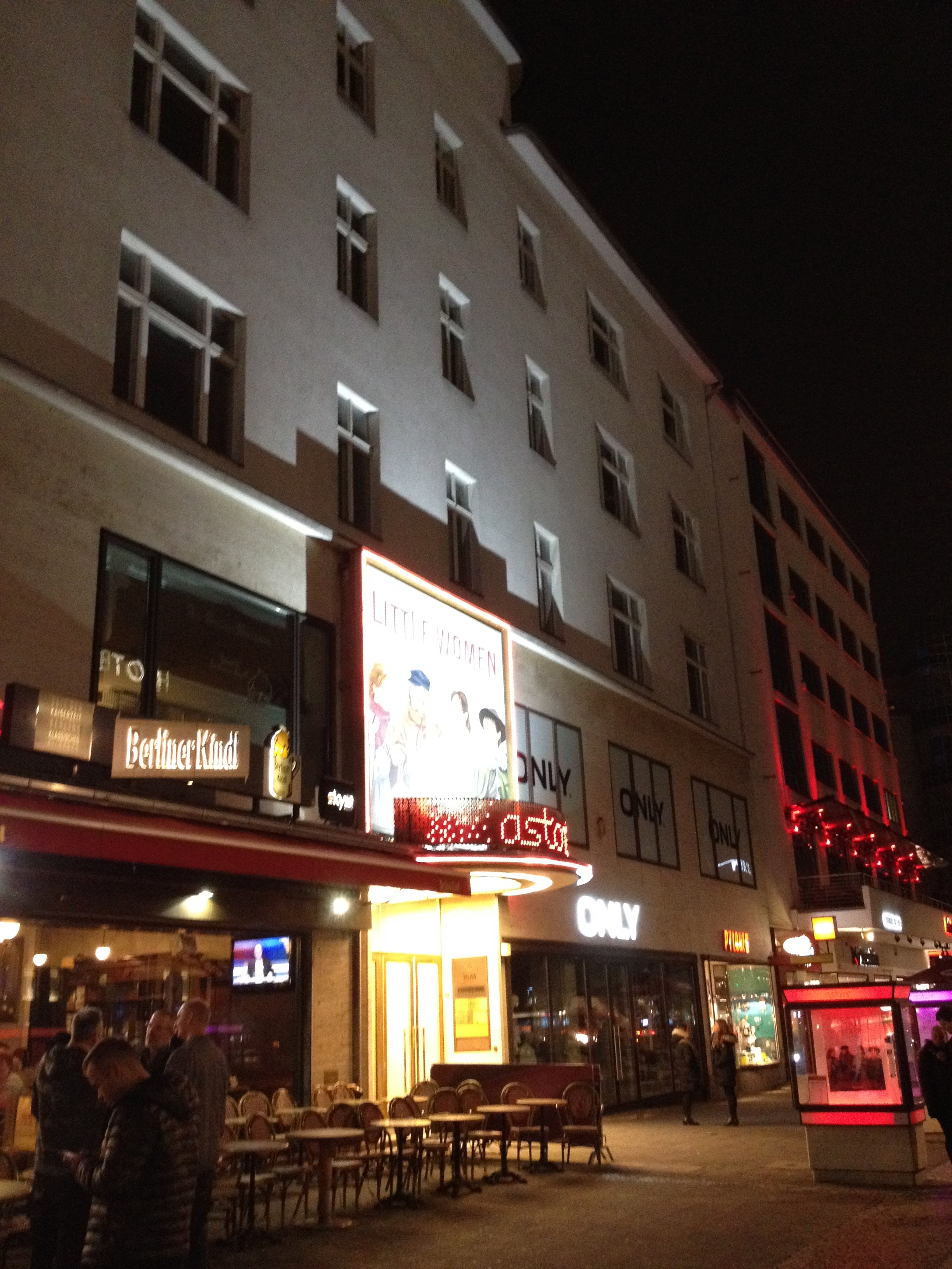 Sitz des Vereins "Europäische Filmakademie e.V. " am Kurfürstendamm 225 in Berlin